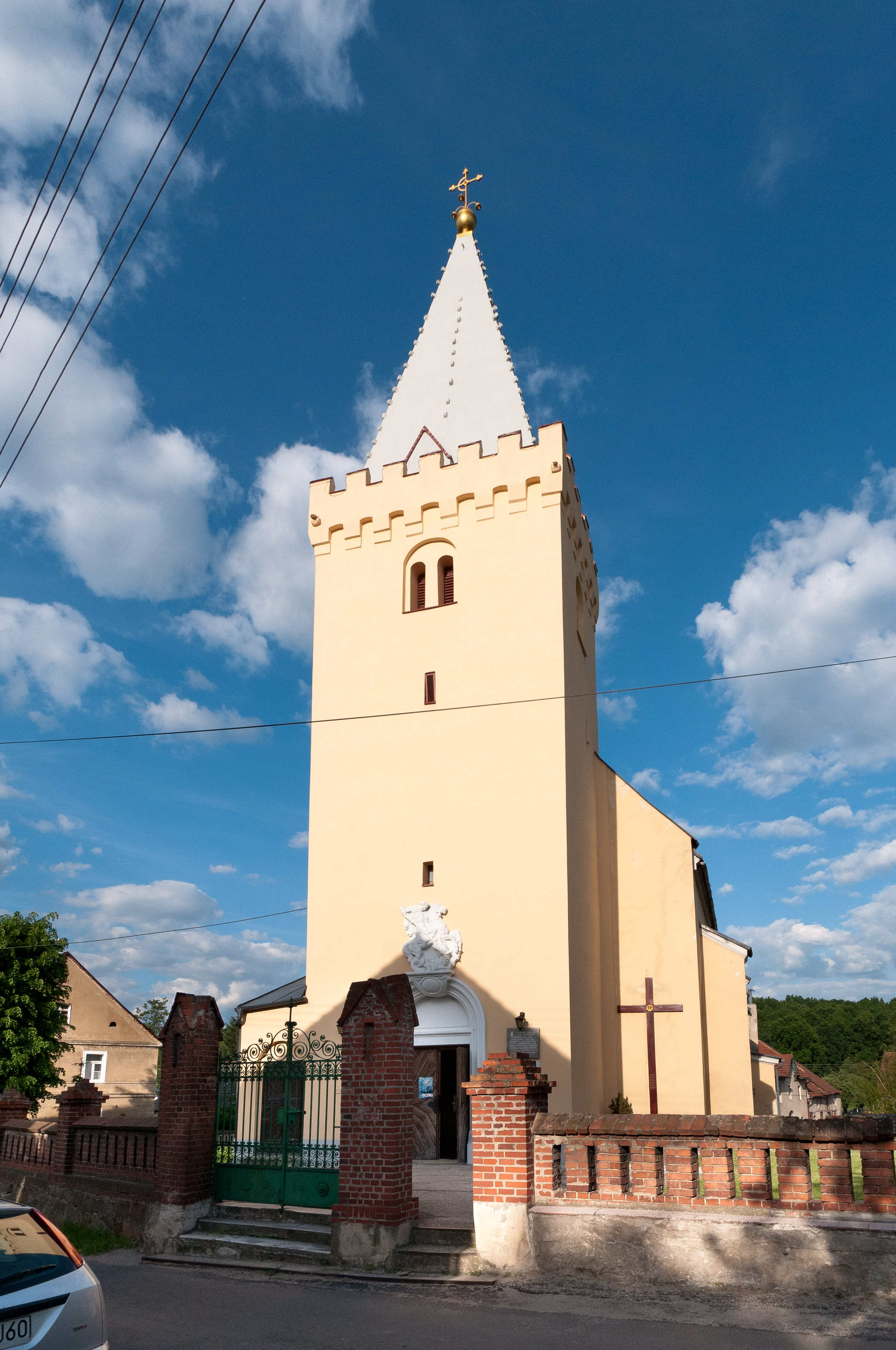 Kościół pw. św. Jerzego, z ok. 1300 r. w Hajdukach Nyskich.